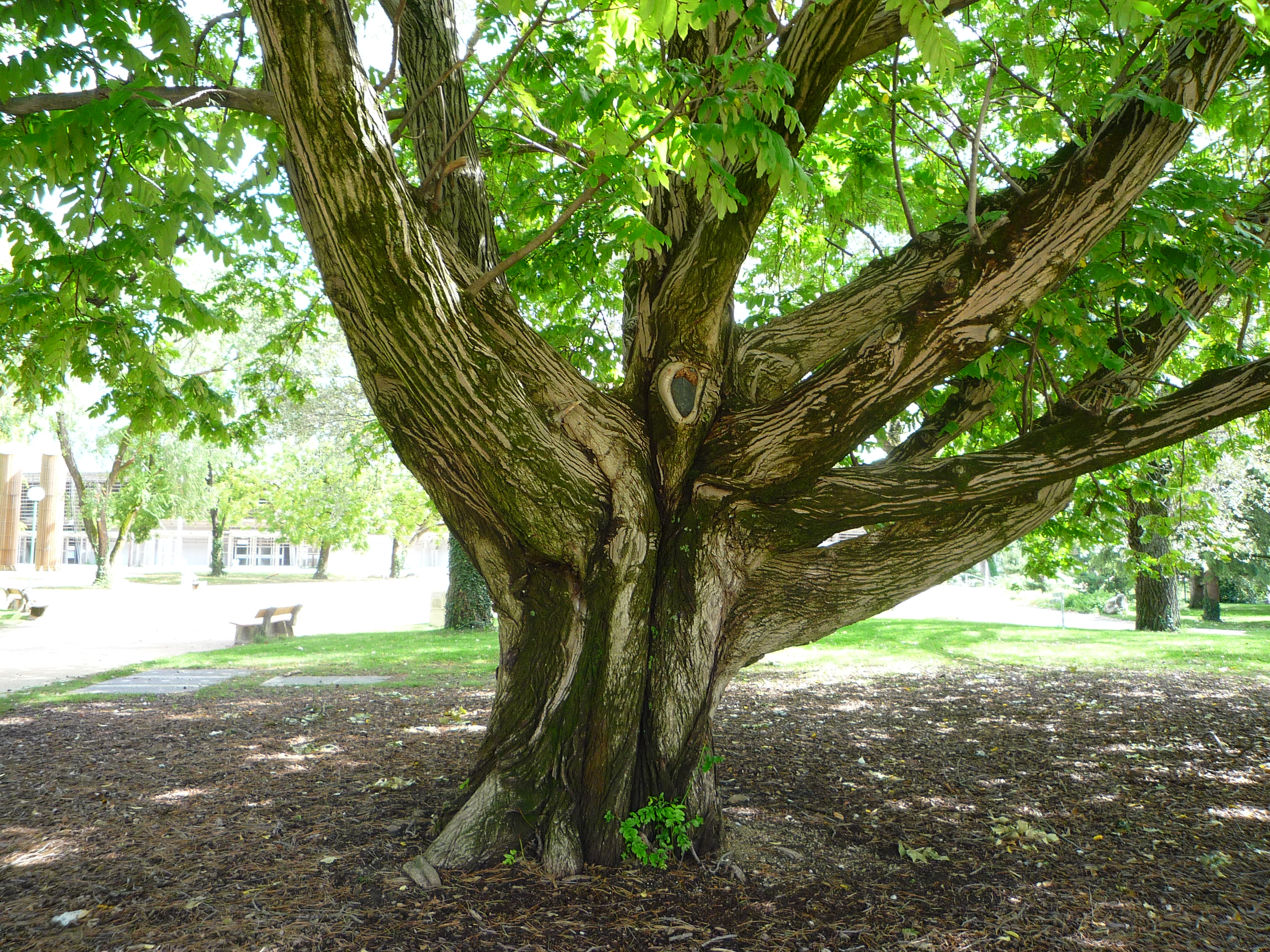 Arbre remarquable dans le parc Paul Mistral - Grenoble